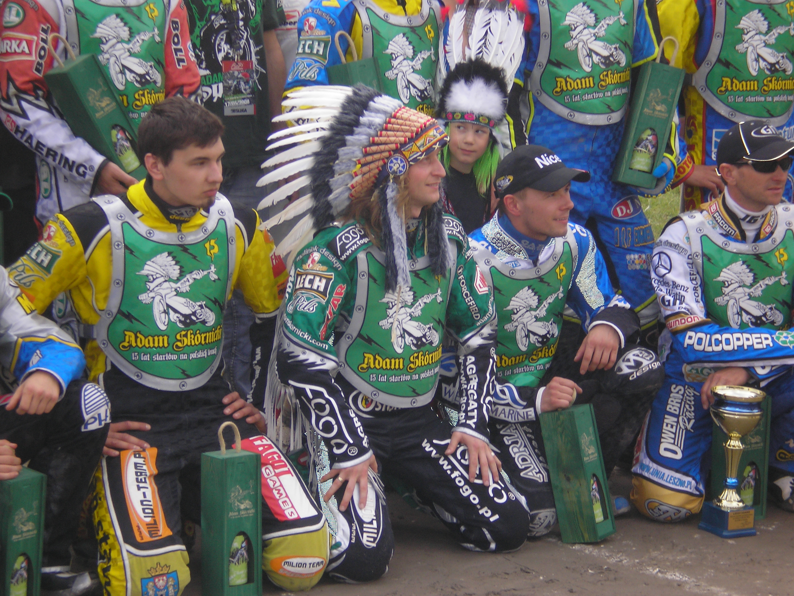 Adam Skórnicki w Poznaniu - Turniej z okazji 15-lecia startów Adama Skórnickiego